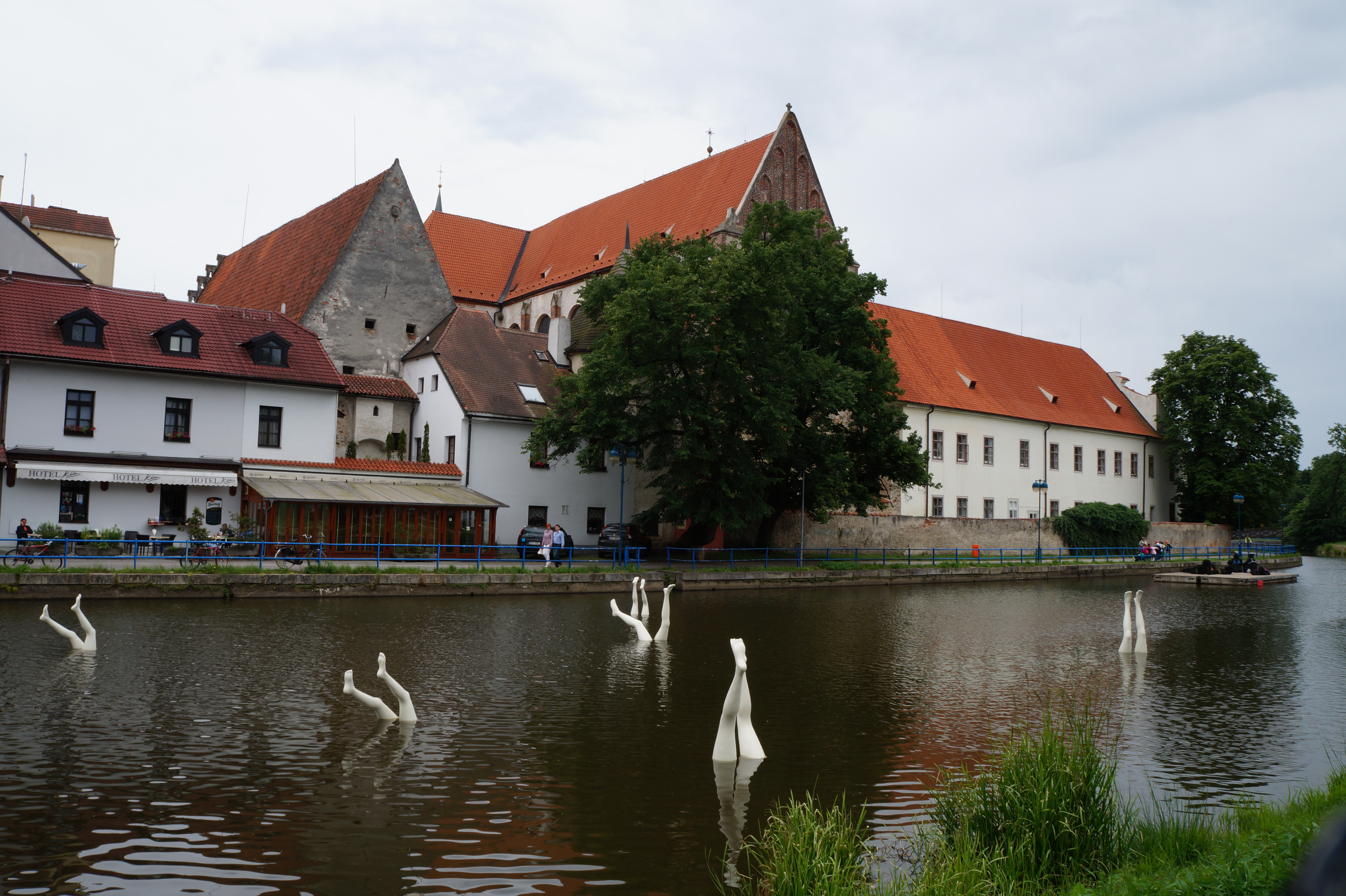 Monasterio y la iglesia con Malše